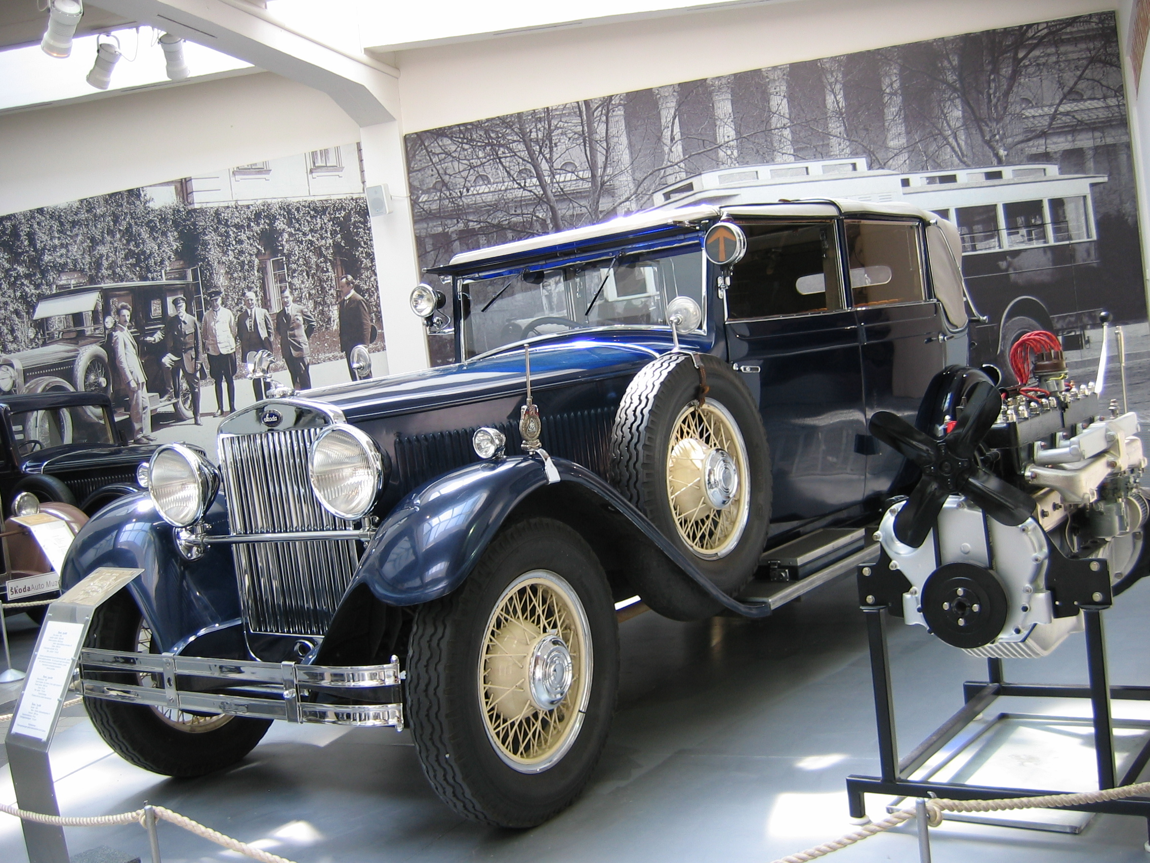 Škoda 860 - Škoda Auto Museum, Mlada Boleslav